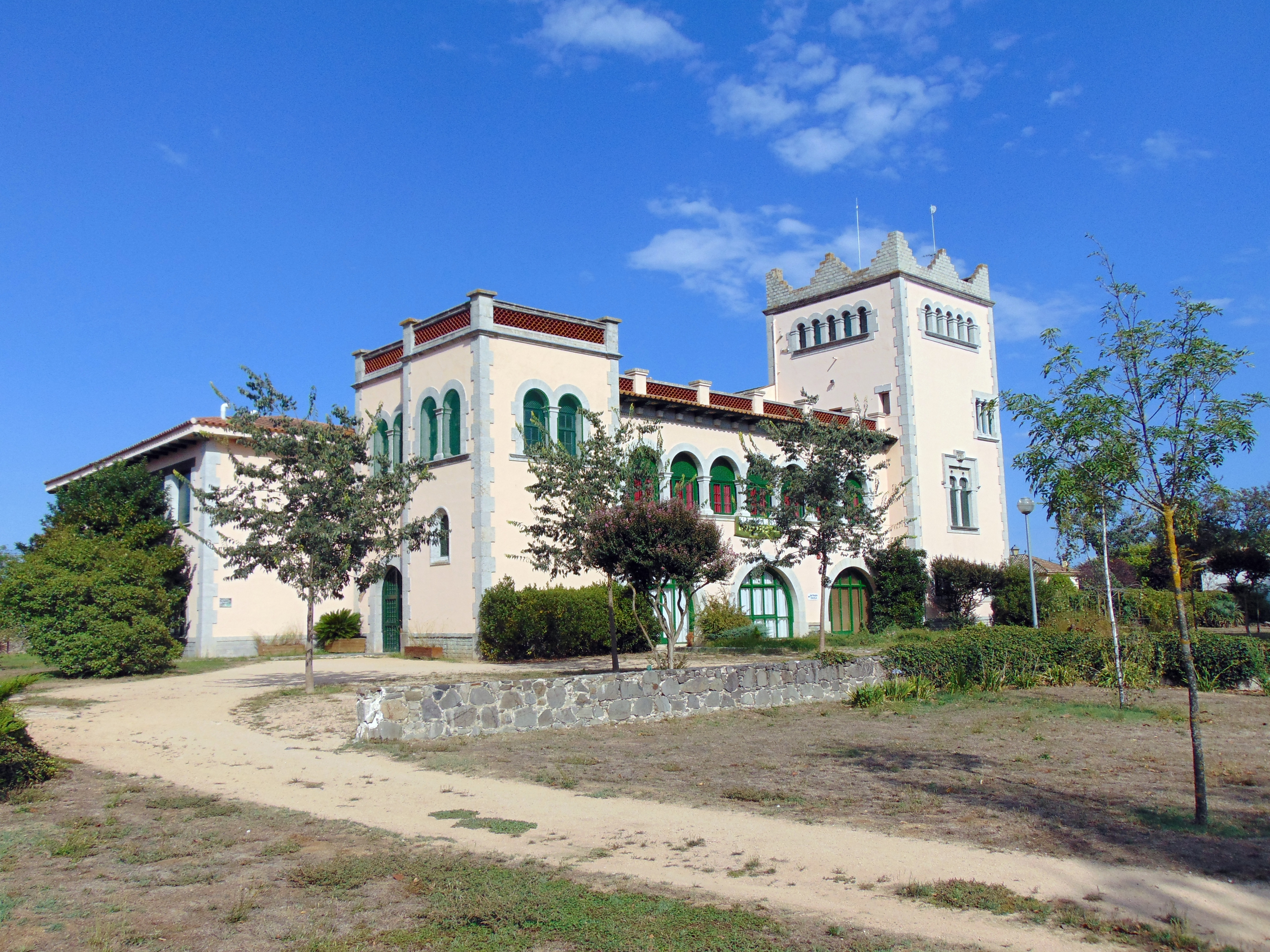 Casa Xifra (Santa Coloma de Farners)